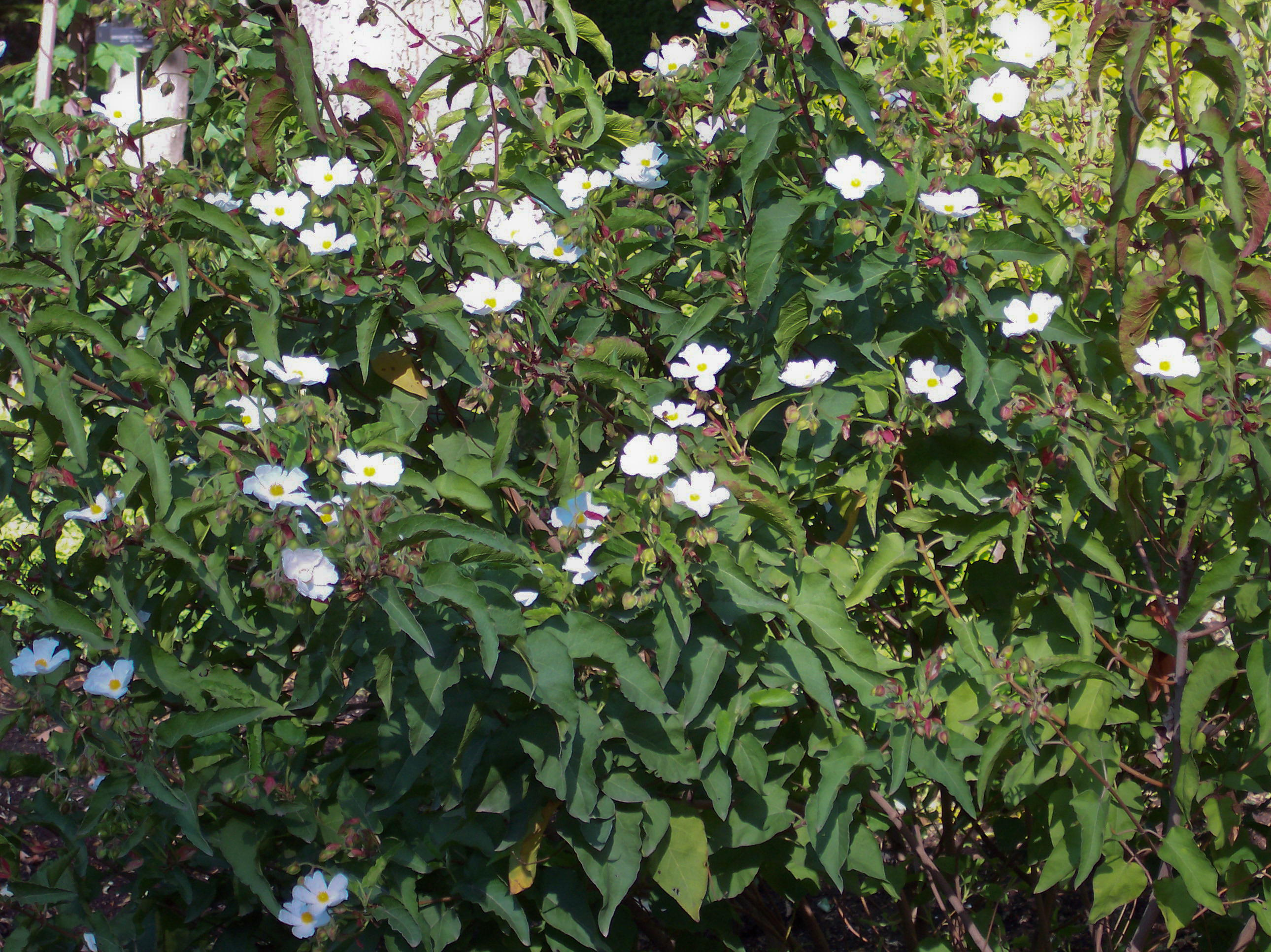 Cistus populifolius subsp. major. Real Jardín Botánico, Madrid